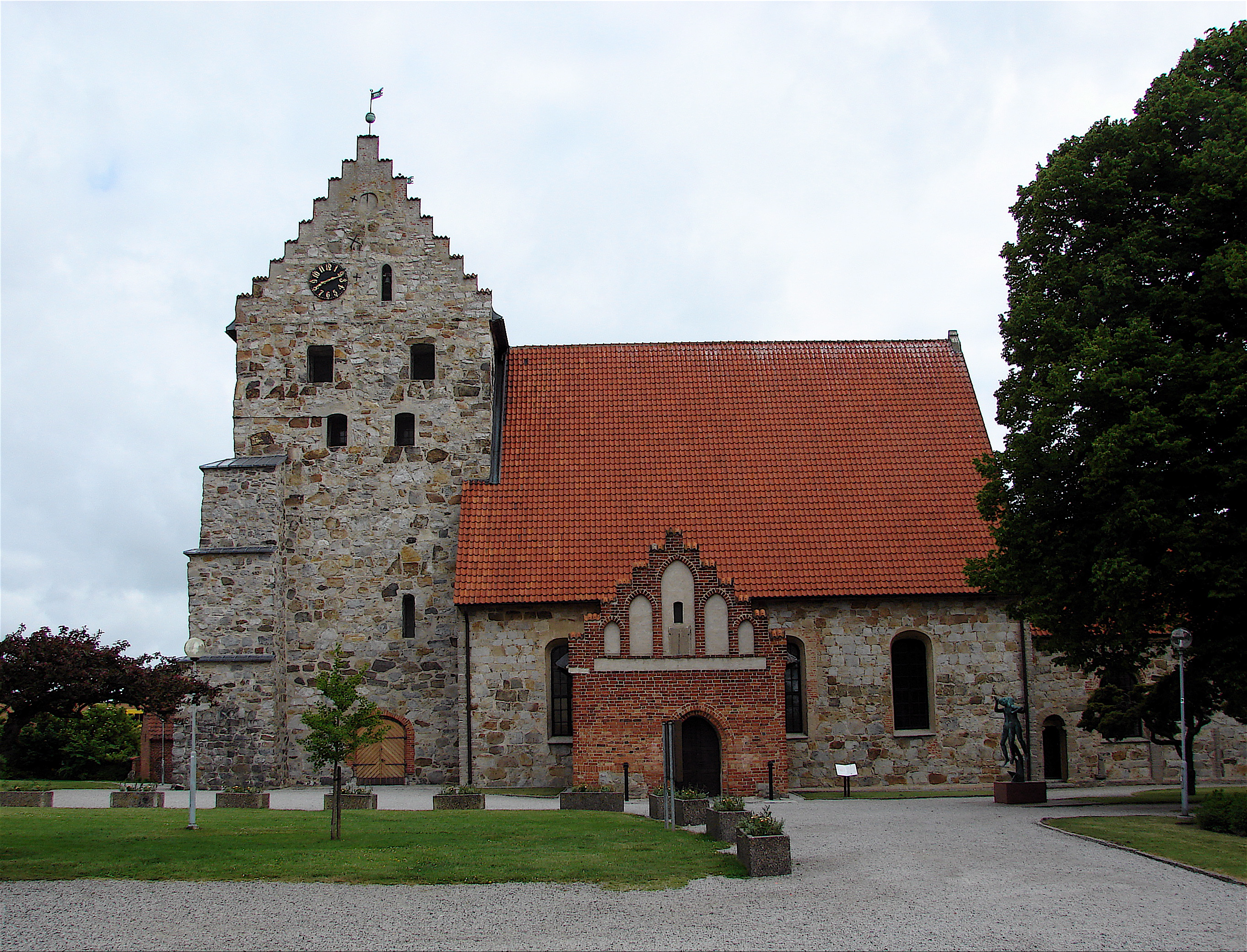 Simrishamn kyrka, Simrishamn kirke, Simmershavn